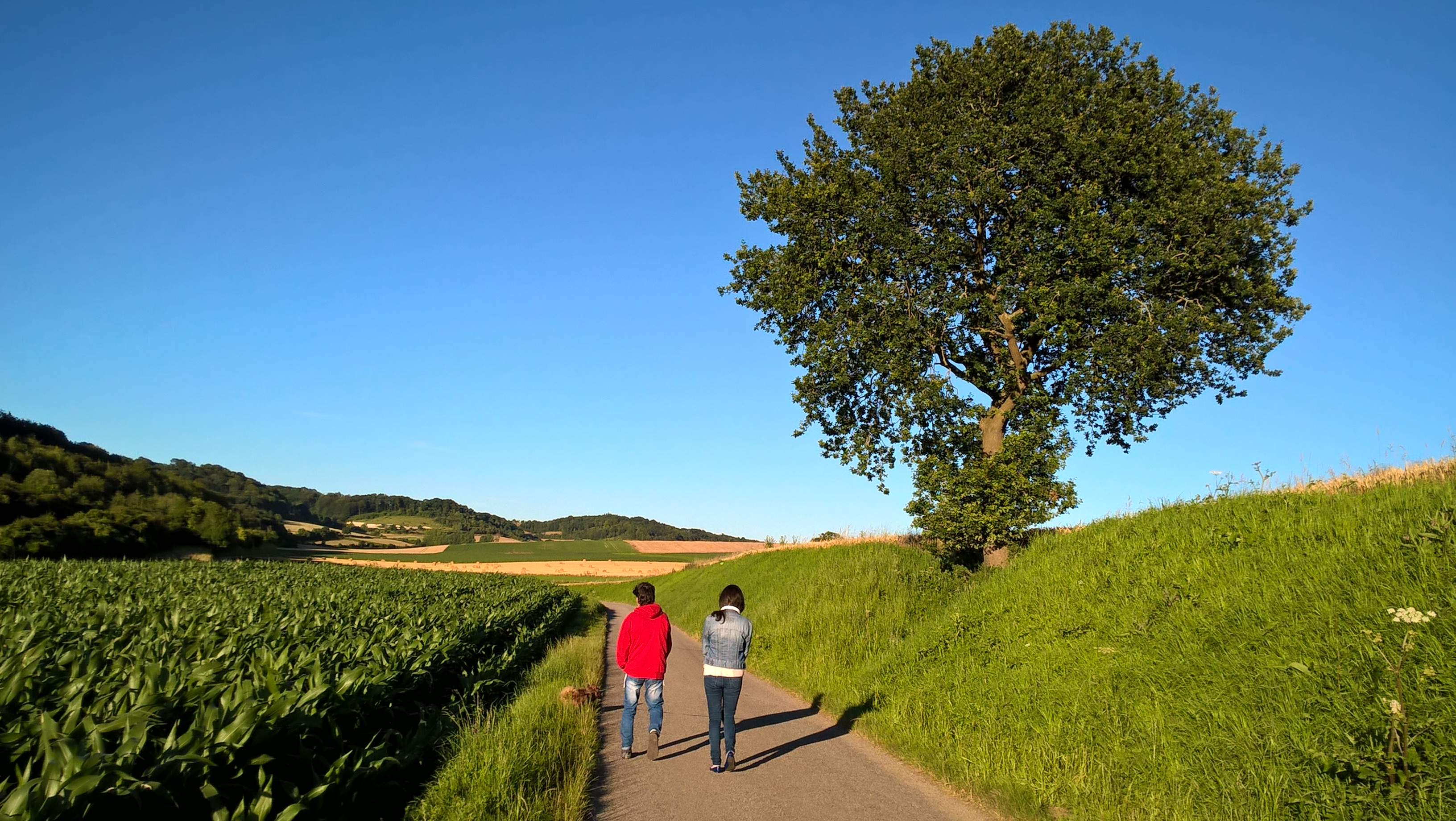 Dampierre-Saint-Nicolas, route des Demagnes, chênes d'une quarantaine d'année .